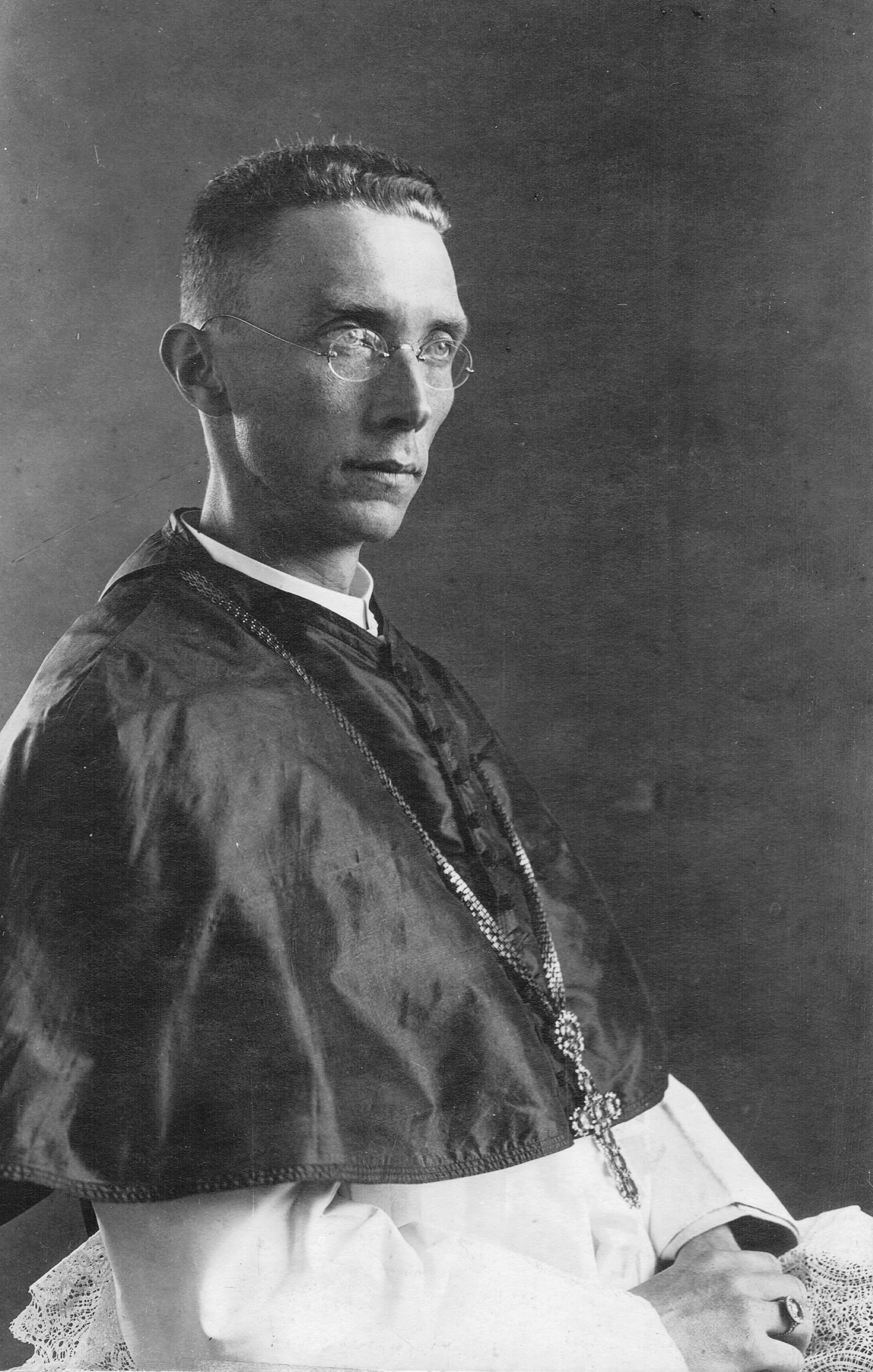 Abt Alois Wiesinger von Schlierbach kurz nach seinem Amtsantritt